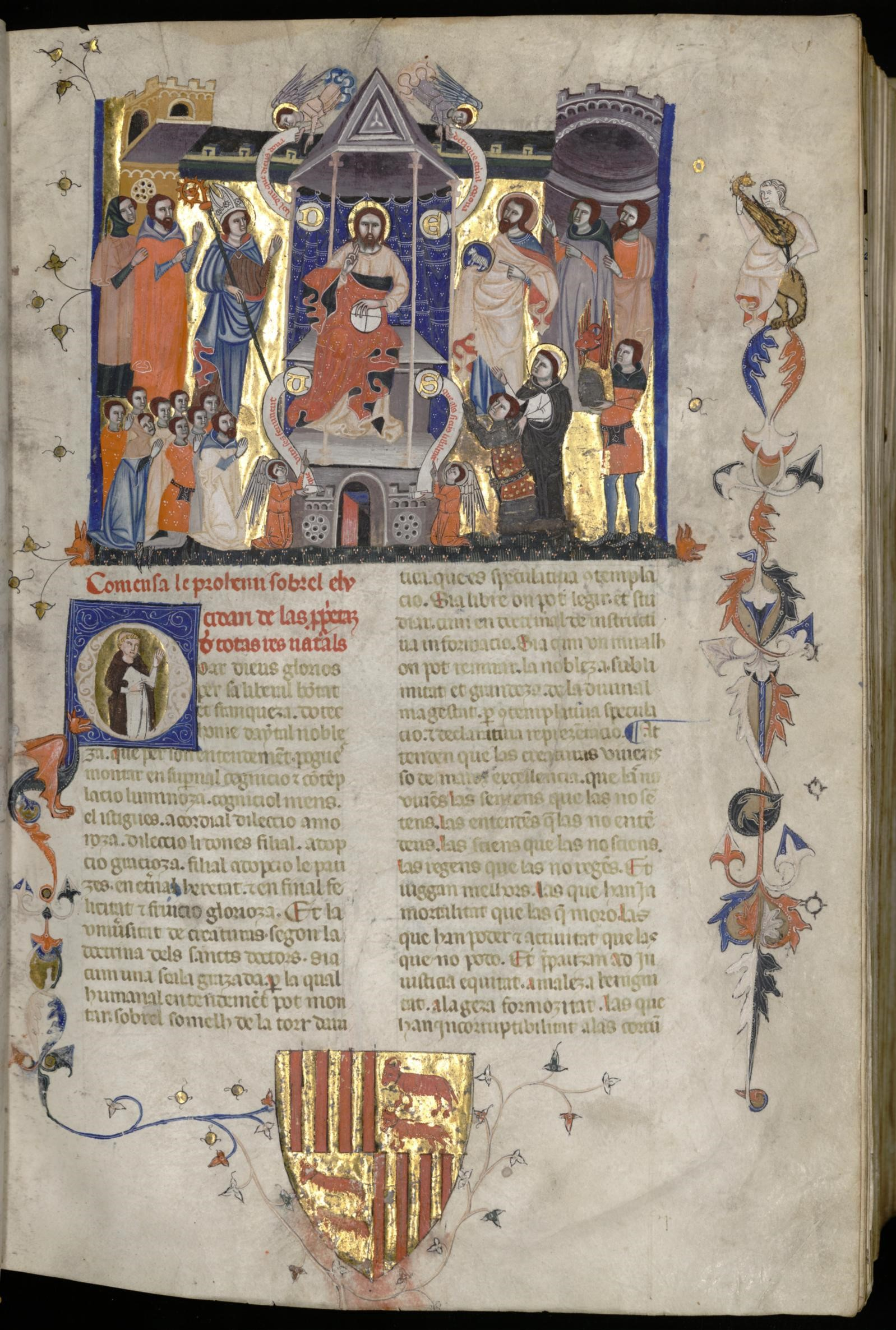 Le Christ en majesté, entouré de saints et de laïcs en prière. A ses pieds, Fébus suivi d'un écuyer qui présente son heaume à cimier.